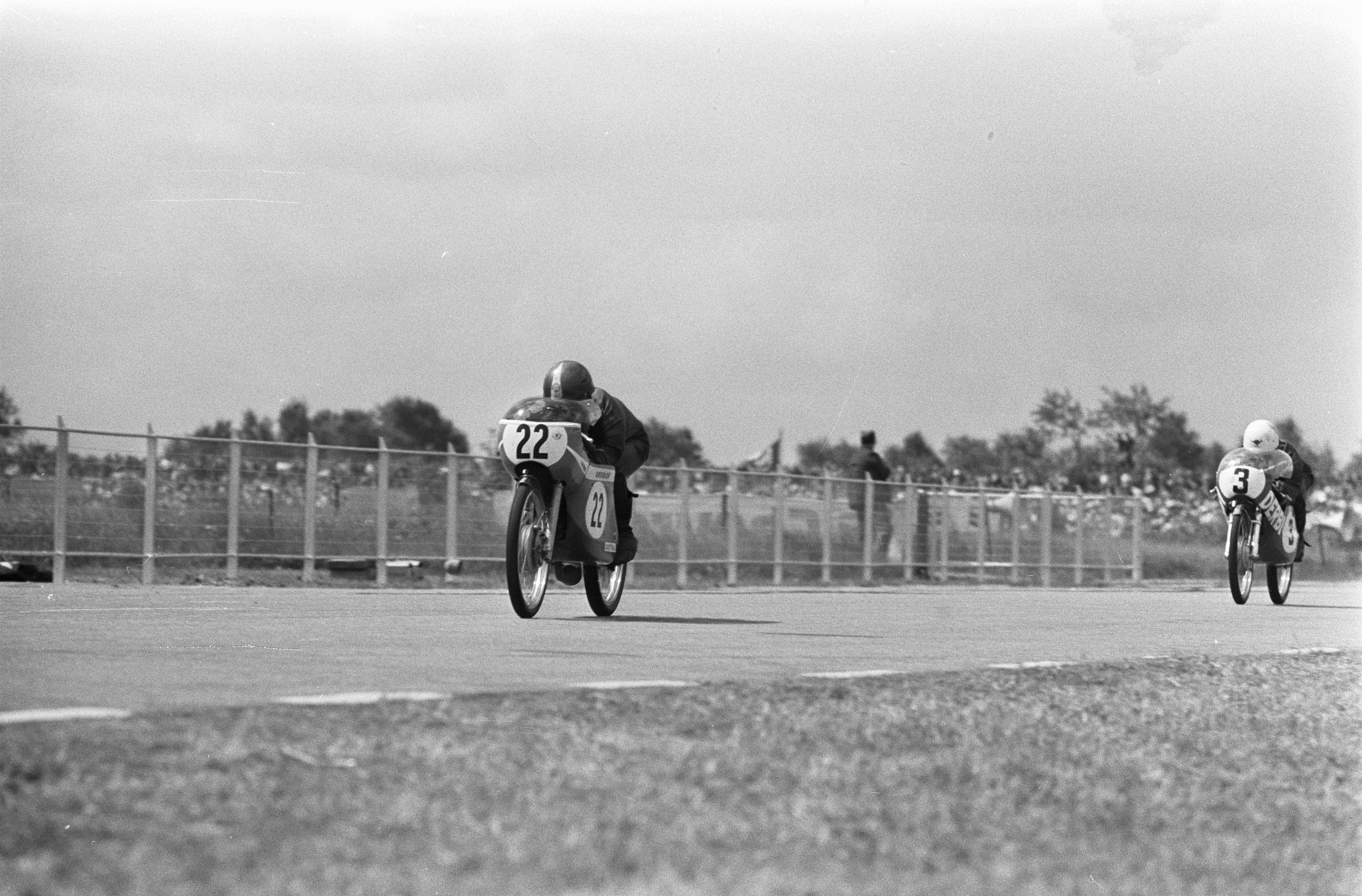 Collectie / Archief : Fotocollectie Anefo Reportage / Serie : TT Assen 1969 Beschrijving : 50 cc Jan de Vries (22) en Barry Smith (3) in actie Datum : 28 juni 1969 Locatie : Assen, Drenthe Trefwoorden : motorcoureurs, motorraces, motorsport, racecircuits Persoonsnaam : Smith, Barry, Vries, J. de Fotograaf : Fotograaf Onbekend / Anefo Auteursrechthebbende : Nationaal Archief Materiaalsoort : Negatief (zwart/wit) Nummer archiefinventaris : bekijk toegang 2.24.01.05 Bestanddeelnummer : 922-5829